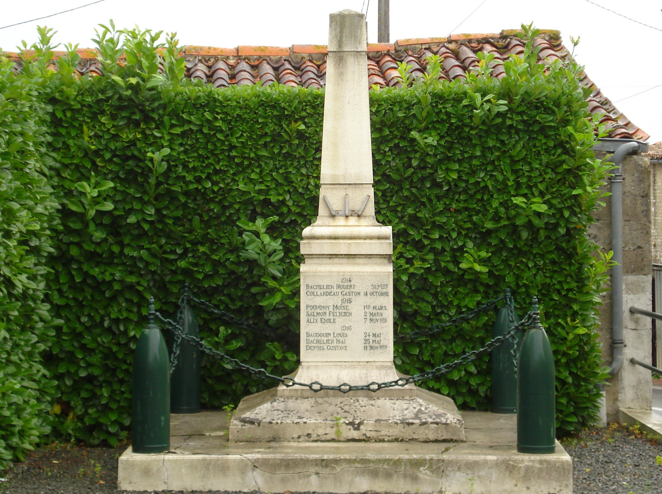 La monuments aux morts de La Villedieu (Charente-Maritime)